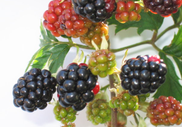 Mûres sauvages (du Roncier) Photo de FoeNyx - Lille - 2004